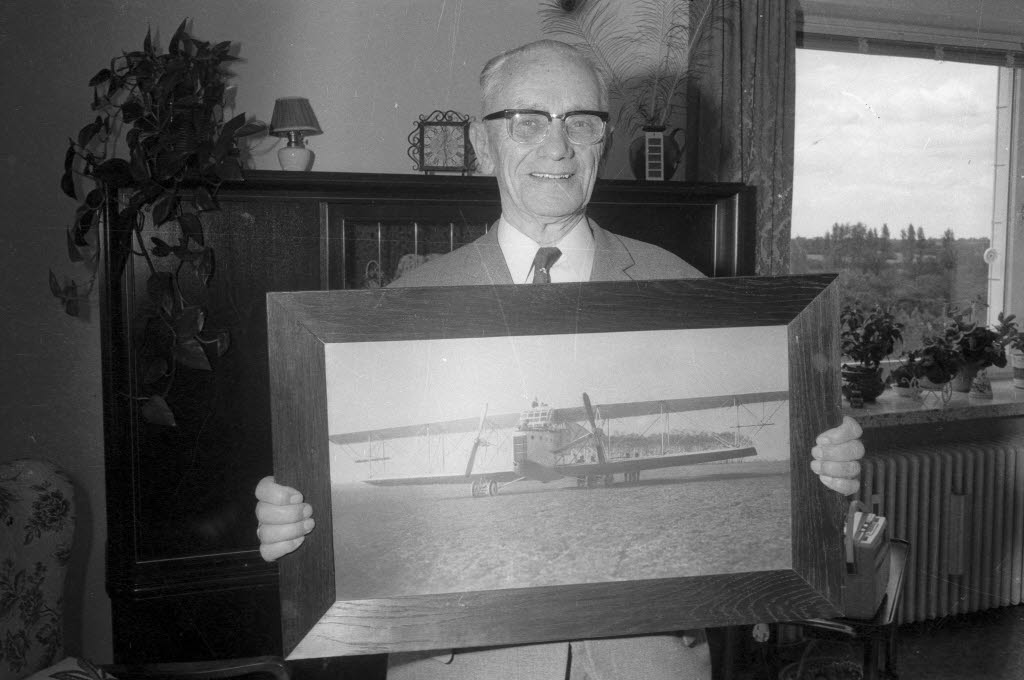 feiert 80. Geburtstag. Er zeigt ein Foto des nach seinen Plänen gebauten Großflugzeugs von 1915. Der in Gaarden geborene Steffen und sein Bruder Franz widmeten sich bereits vor dem 1. Weltkrieg dem Fliegen und der Flugzeugkonstruktion. In Kronshagen, wo er seit langem lebt, ist Steffen außerdem als Wirt des ehemaligen Ballhauses Brunos Lust bekannt.